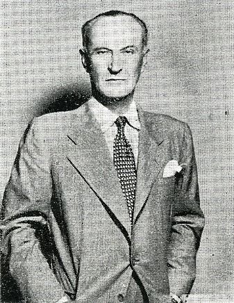 Antonín Raymond (1888 - 1976), Český architekt.